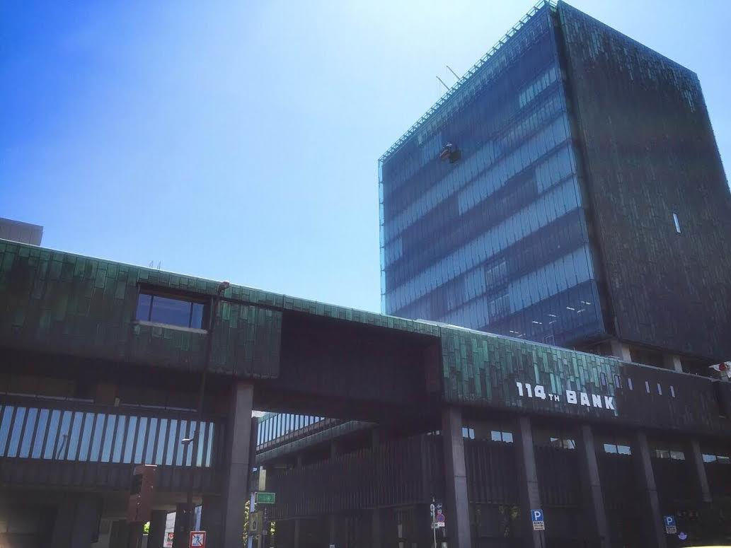 百十四銀行本店ビルの全体像